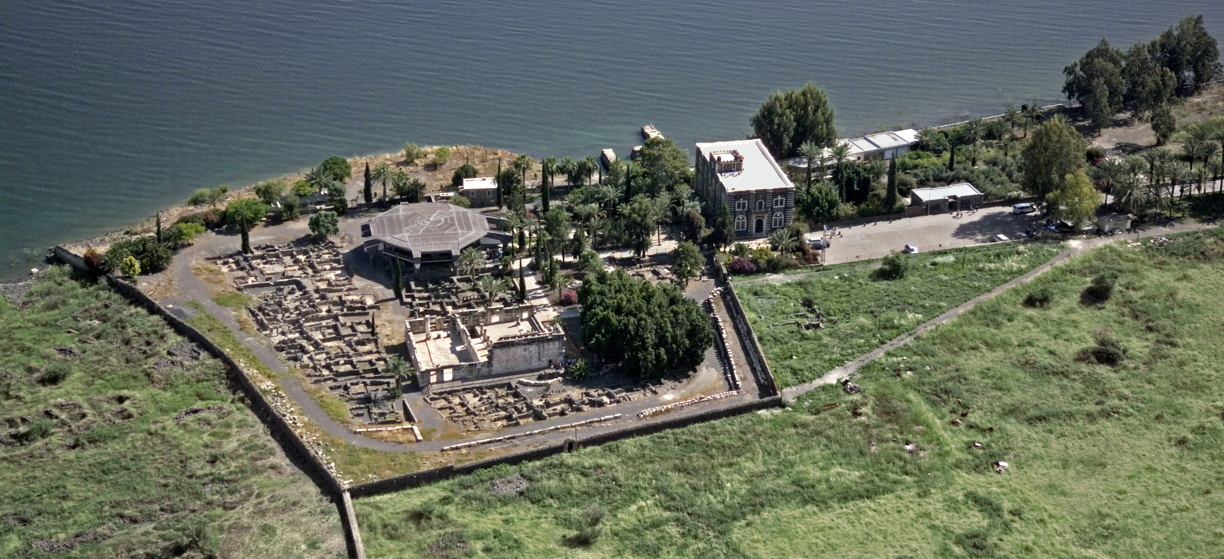 Capernaum - Aerial view